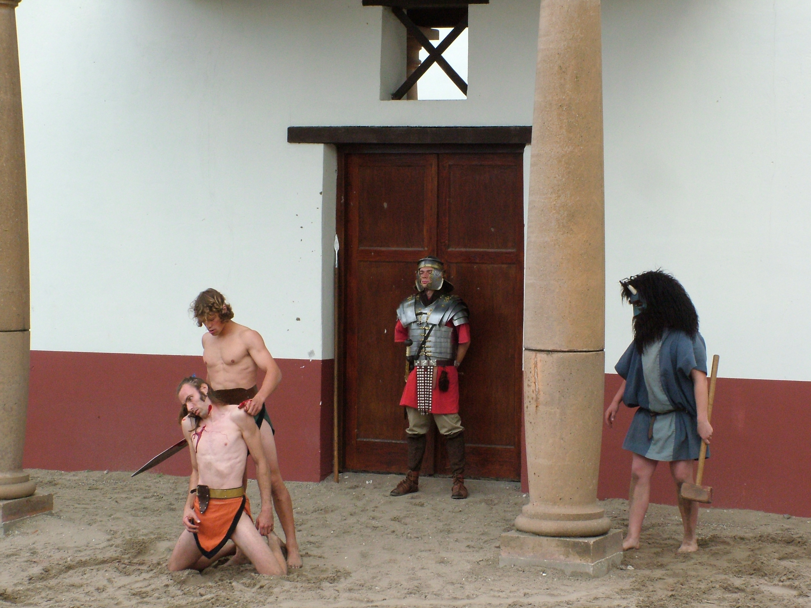 Archeon, dood van de overwonnen gladiator, rechts staat Charon.